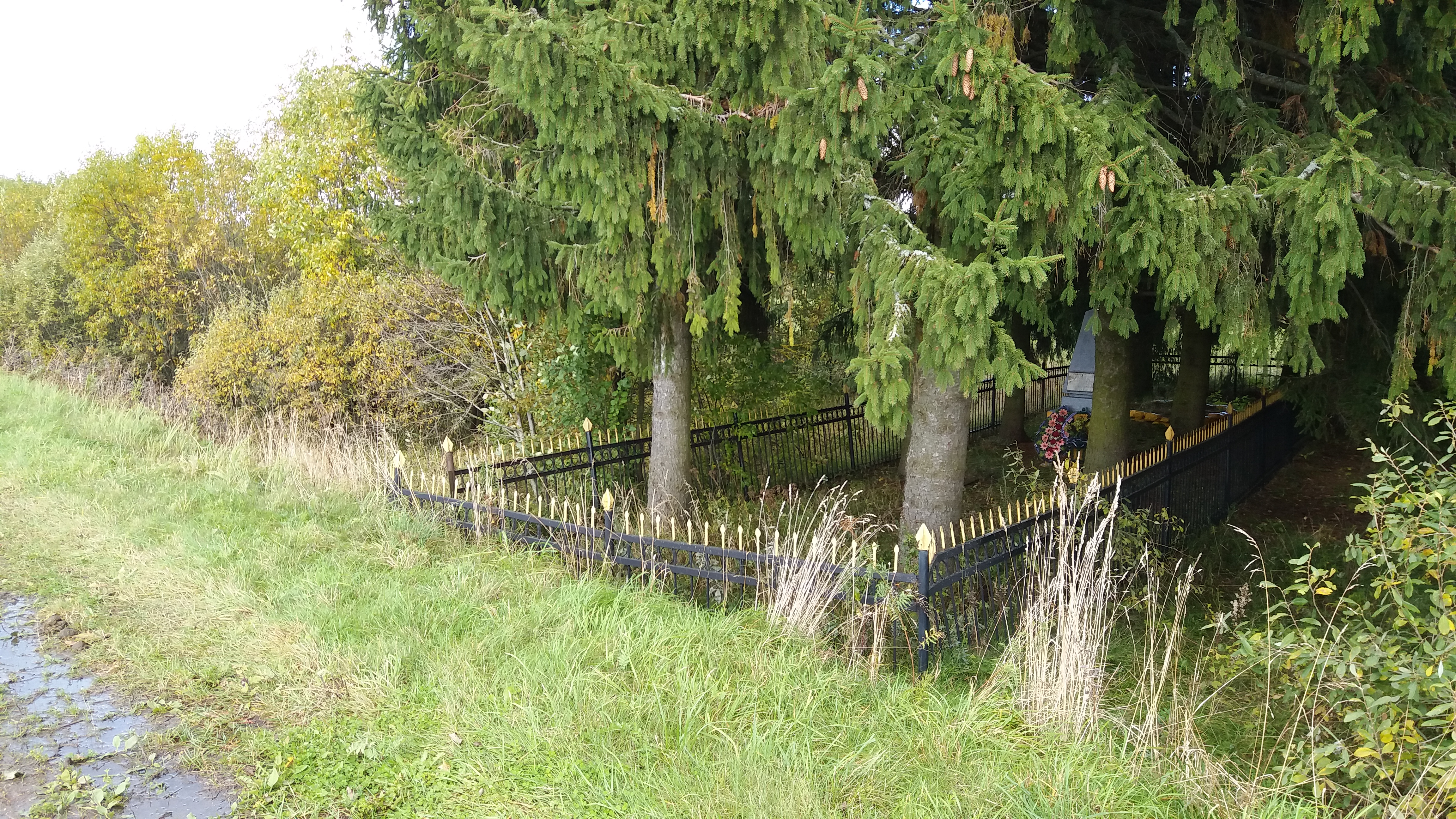 Памятник евреям деревни Островно (Бешенковичский район Витебской области), убитым 30 сентября 1941 года. Установлен в 1956 году на месте расстрела. Находится в 2,9 километра от трассы М3, в 900 метрах от указателя границы деревни (в 500 метрах от указателя слева от дороги расположено кладбище, а ещё через 400 метров, тоже слева от дороги, прямо у обочины - памятник).